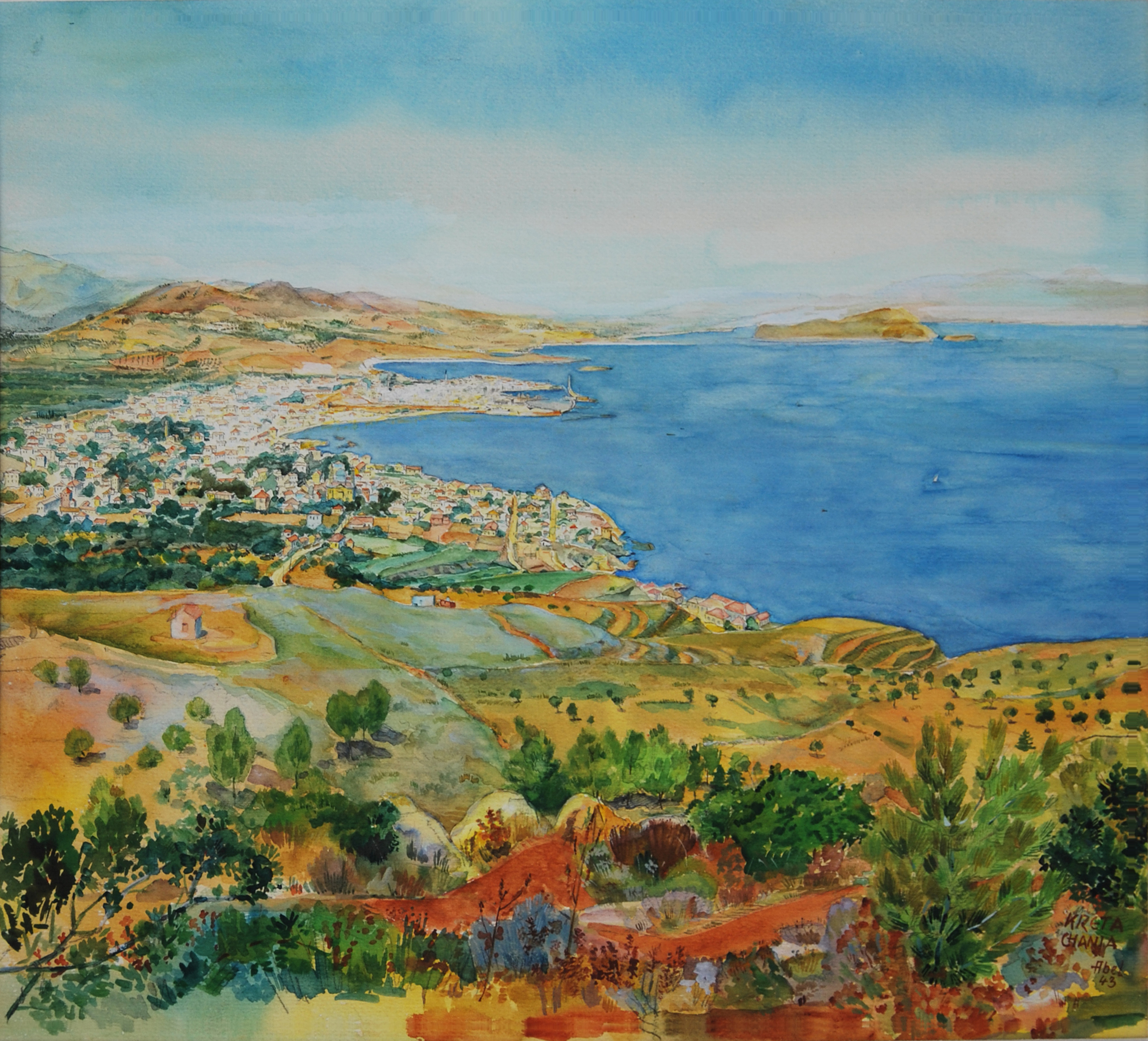 1943. Blick auf Chania. Aquarell 39x33,5 cm Alfons Abel (1908–1994) DescriptionGerman stained-glass artist, painter and aquarellistDate of birth/death 19 January 1908 28 June 1994Location of birth/death Nuremberg NurembergWork location Nuremberg (1925), Munich (1928-1929), Berlin (1929-1931), Nuremberg (1931-....), Sofia (1934), Crete (1942-1946), Egypt, Cairo, Nuremberg (1947-1994), GreeceAuthority control : Q1636988 VIAF: 695148814287645330004 GND: 1126121169 creator QS:P170,Q1636988